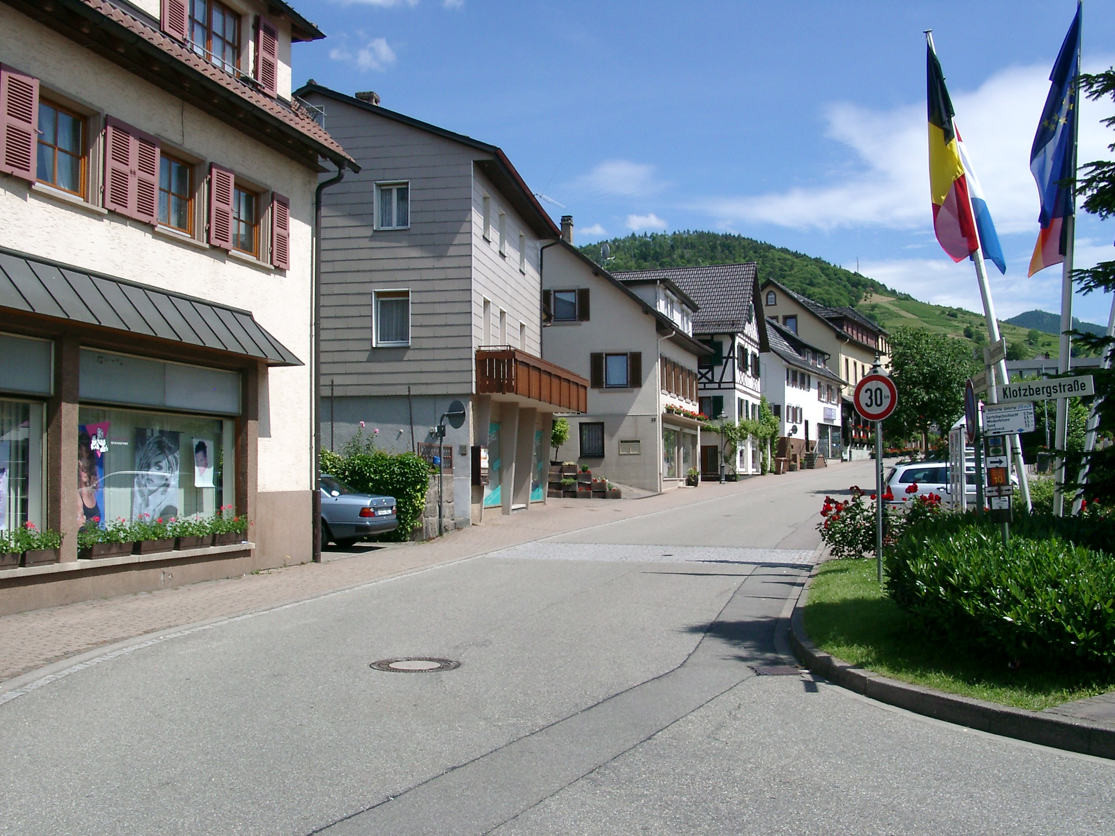 Bühlertal, Untertal, Hauptstraße Ecke Klotzbergstraße